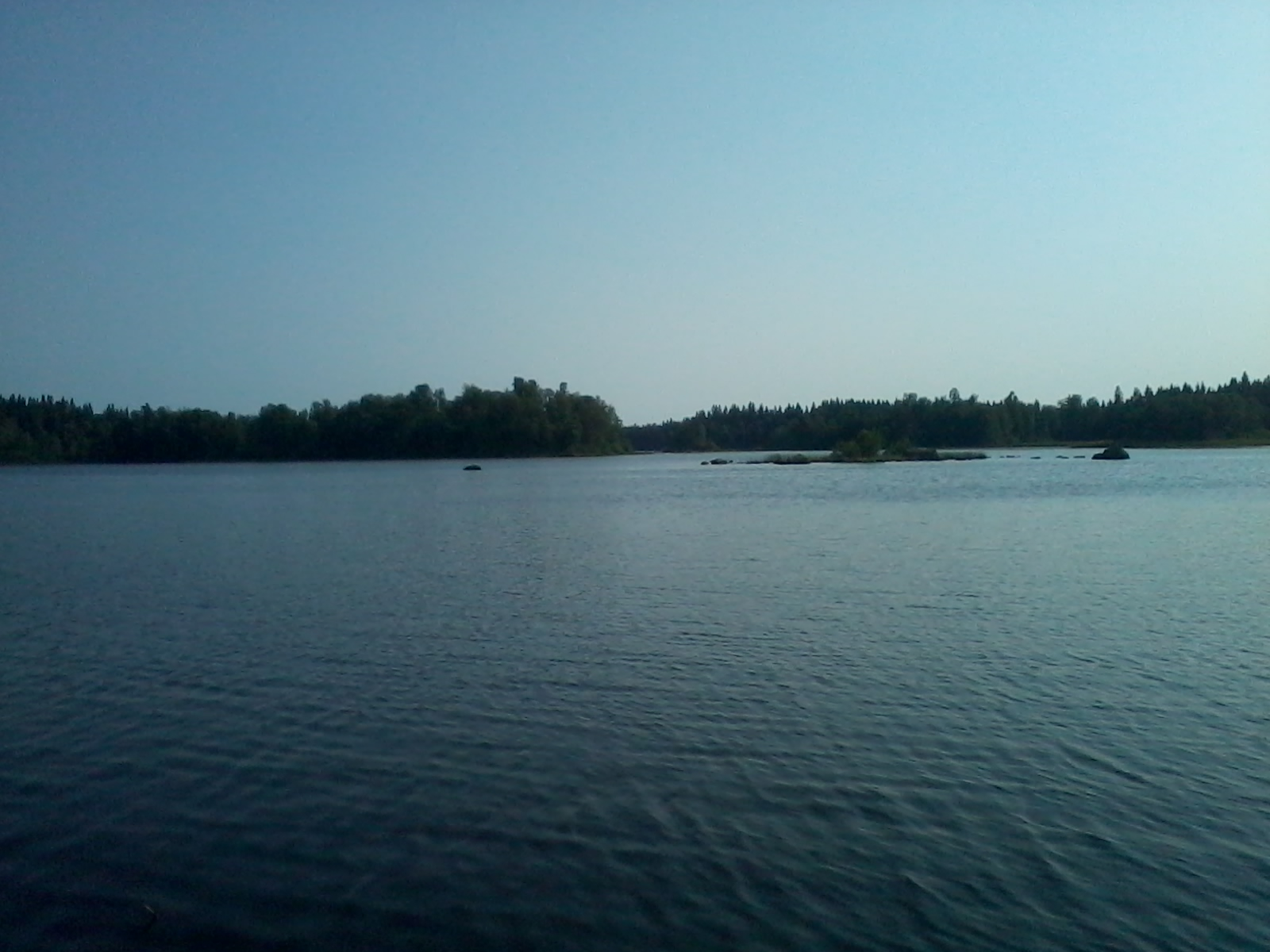 Nätterhövden sedd från strand kanten i Sneremåla.